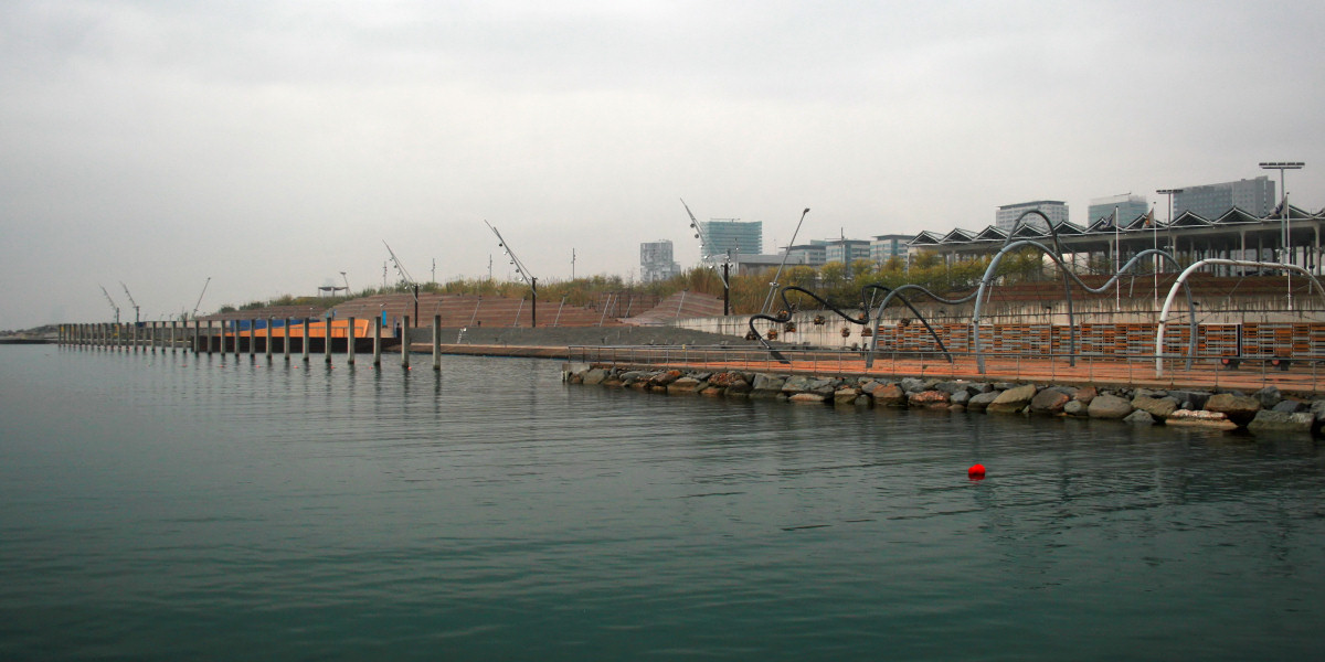 Zona de banys (Diagonal Mar). Arquitecta: Beth Galí